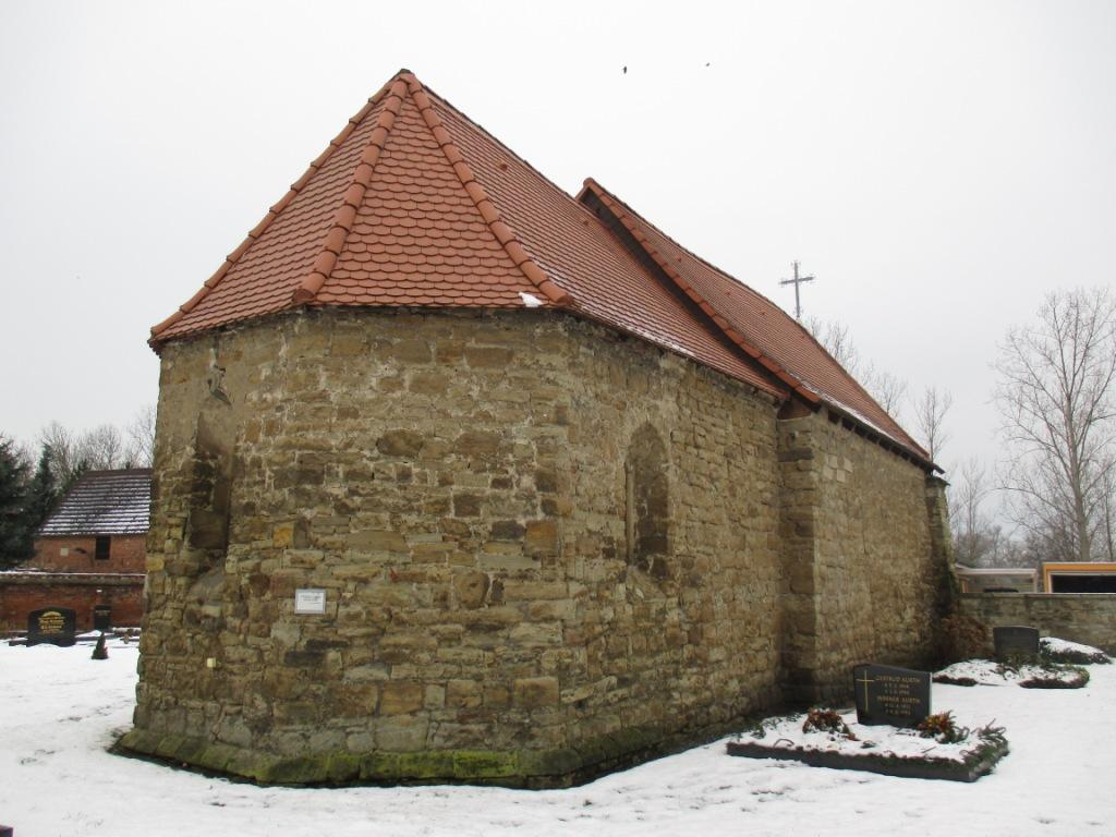 Trebnitz (Merseburg), Dorfkirche